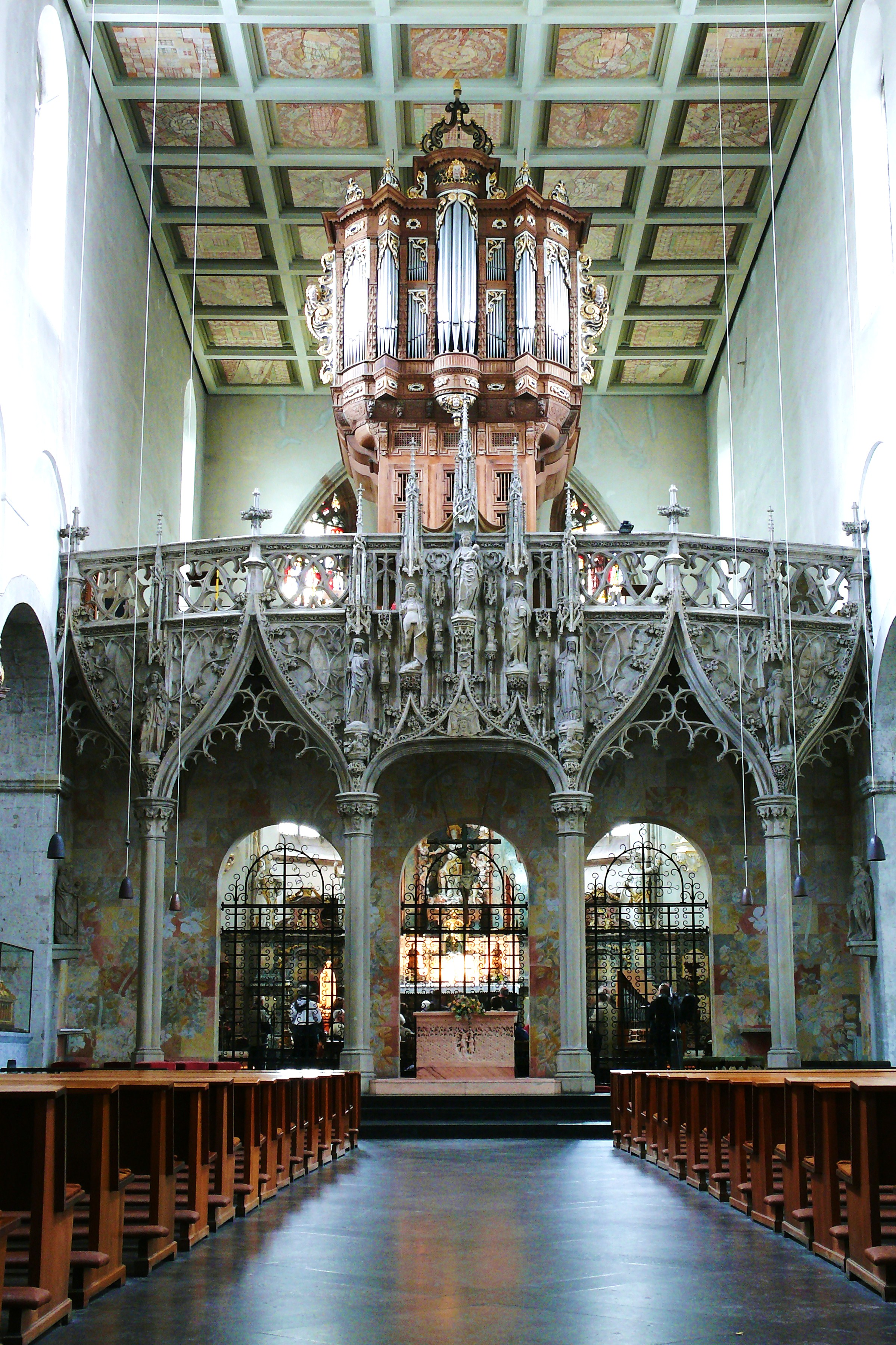 Lettner in der Kirche St.Pantaleon von Köln